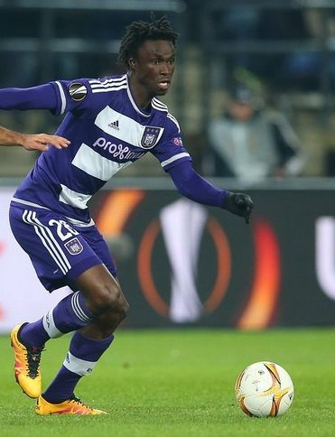 Ідрісса Сілла - футболіст ФК Андерлехта